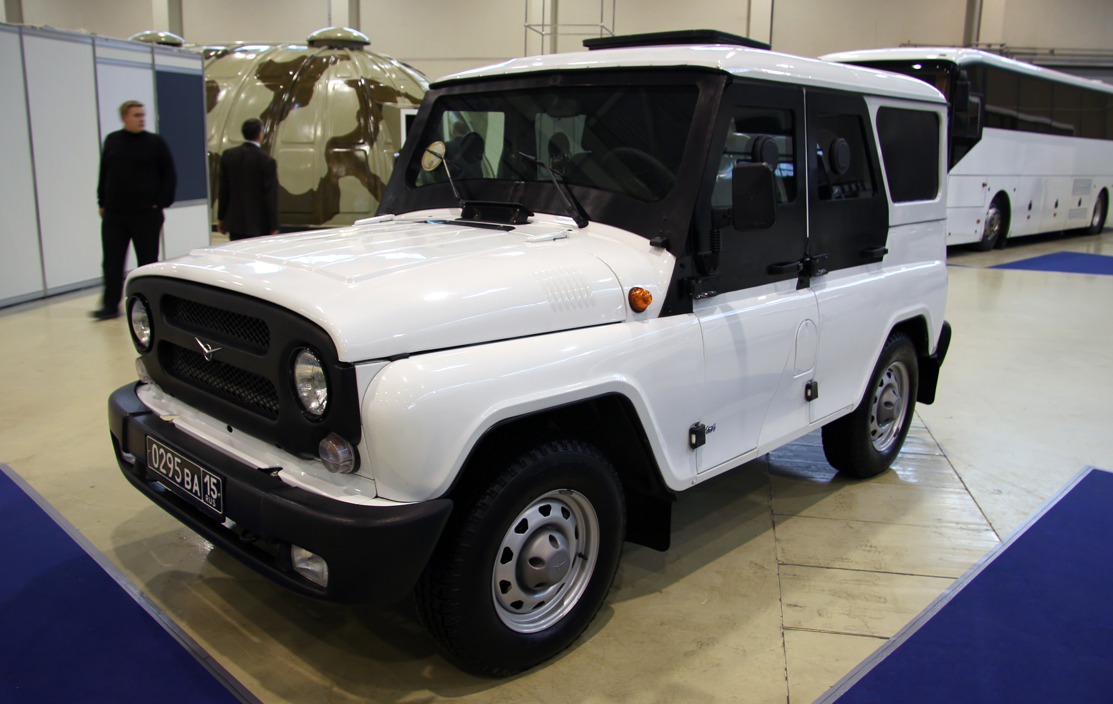 УАЗ-515195 Есаул (Armored UAZ-515195 Esaul)